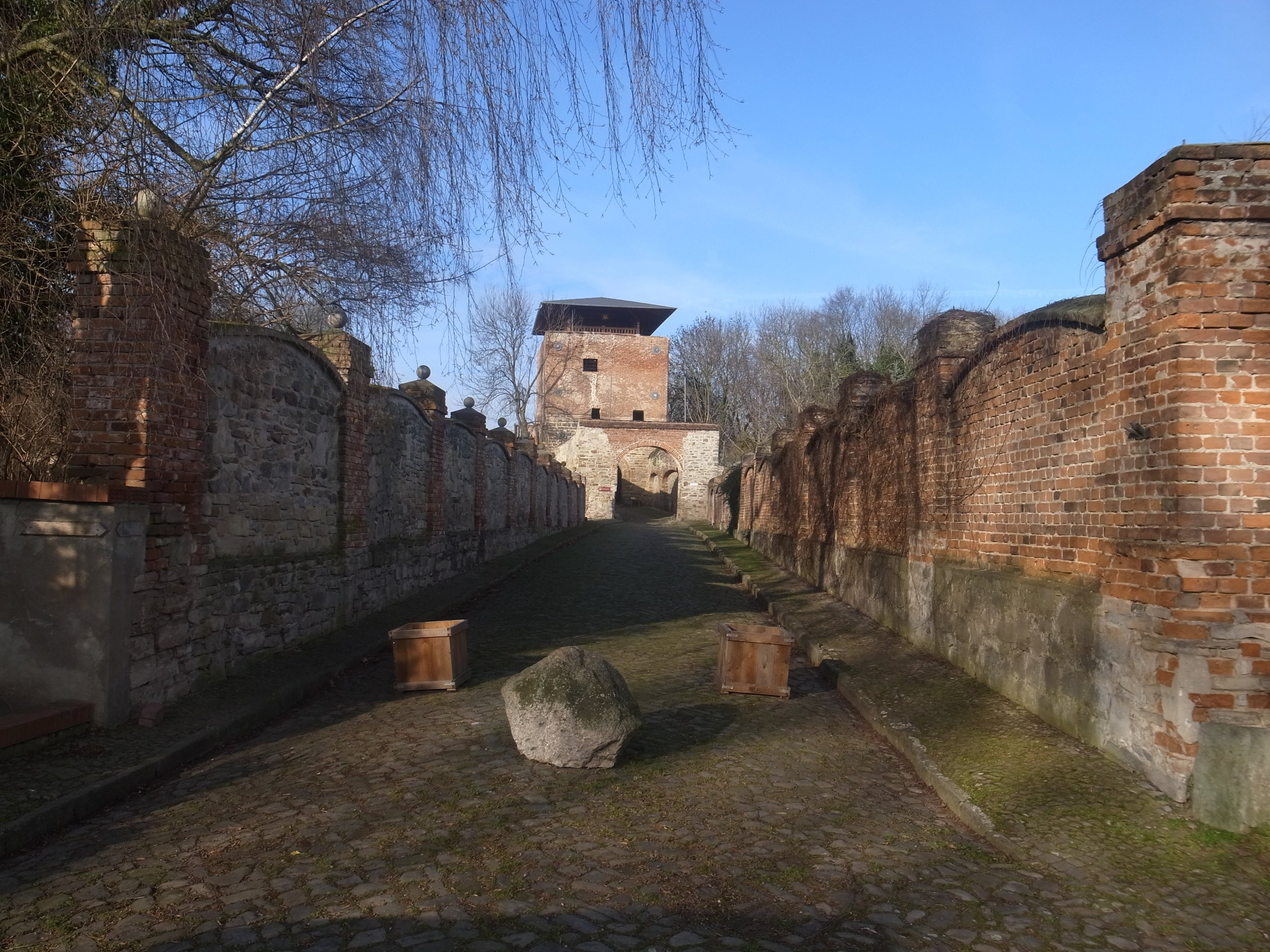 Klein Rosenburg, Torturm und Weg zur Burg.